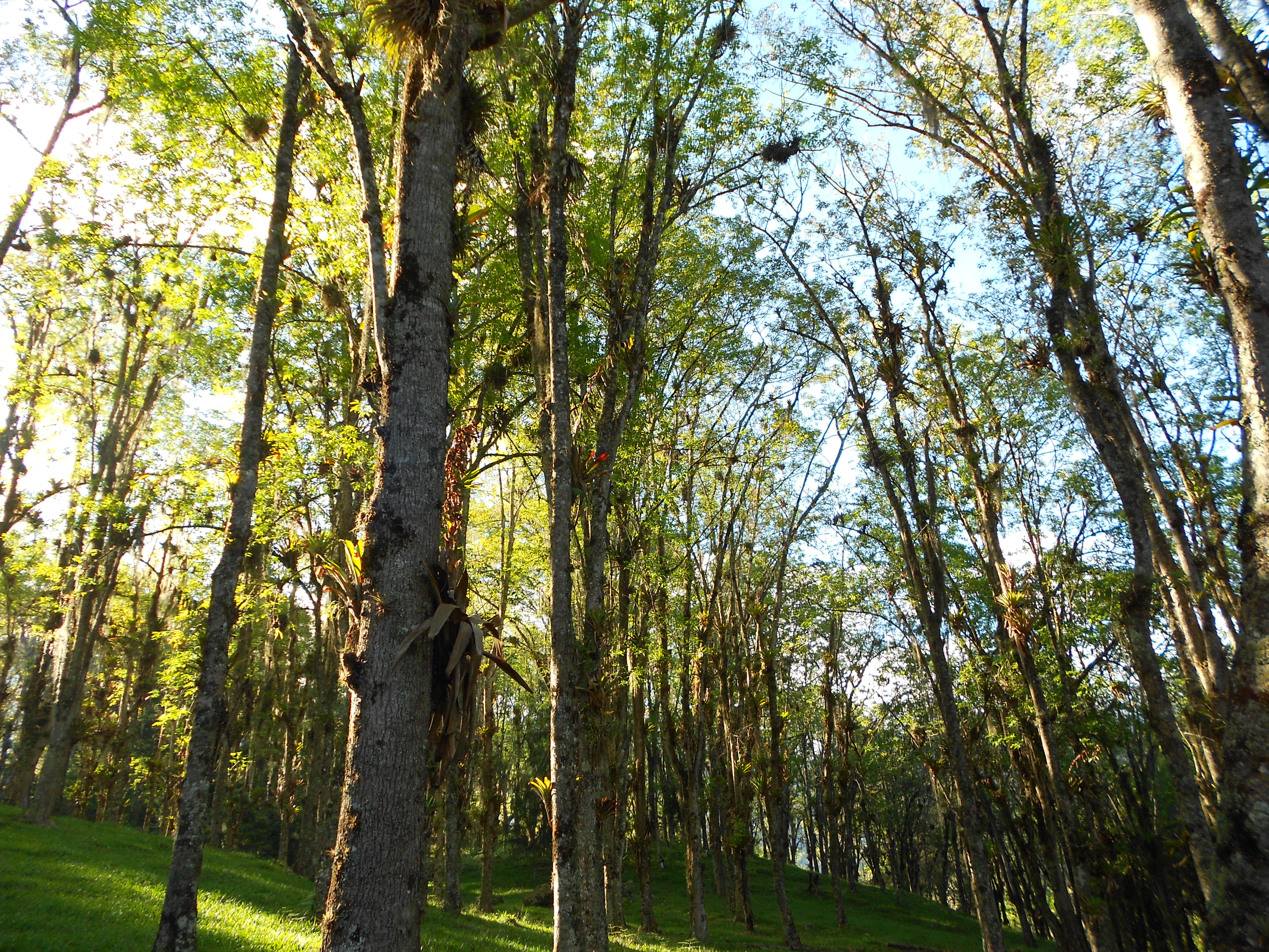 Distintas vistas del paisaje que se puede apreciar una simple mañana en El Valle, estado Mérida.